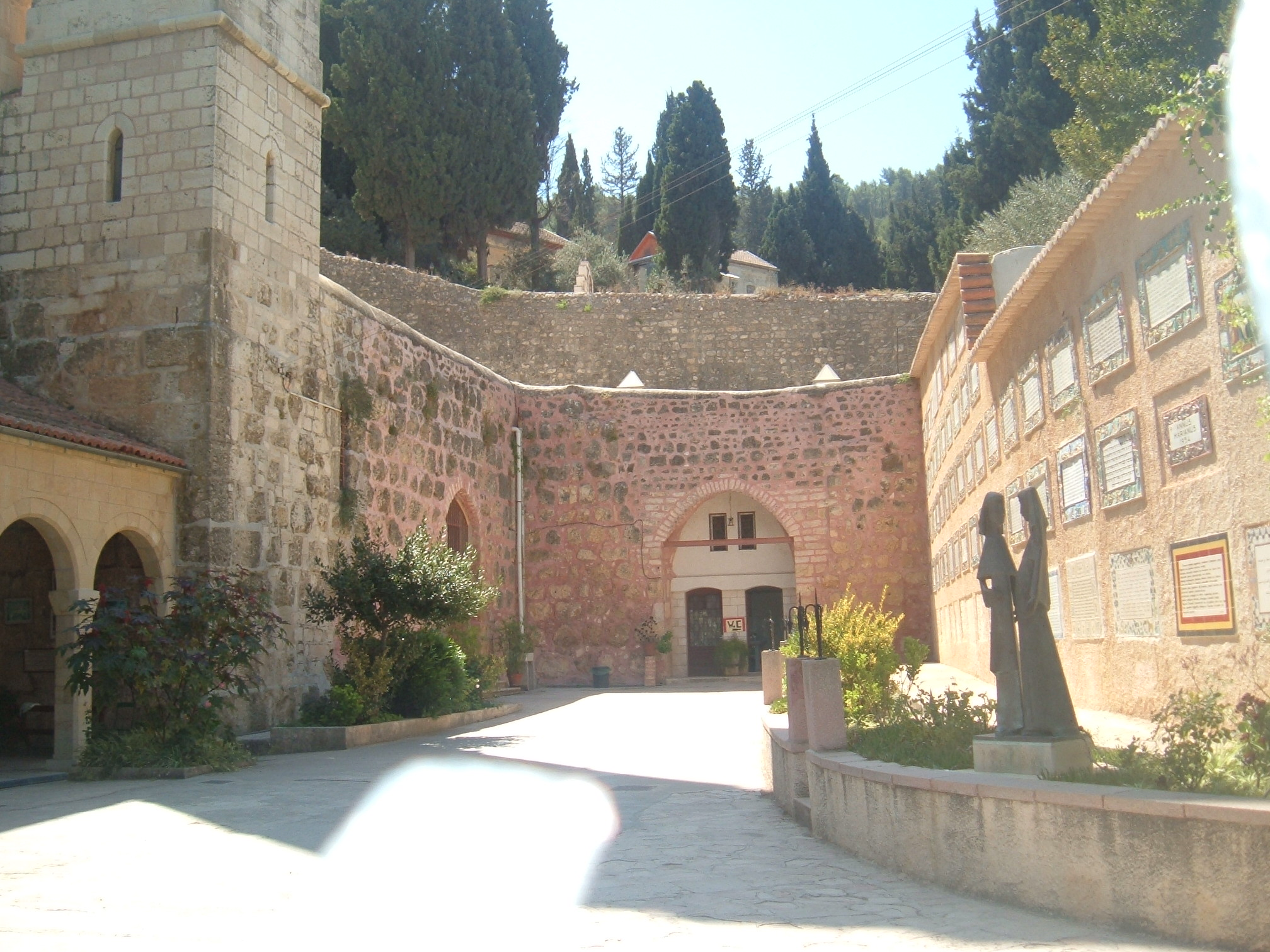 visitation church, ein Karem Jerusalem. כנסיית הביקור, עין כרם, ירושלים